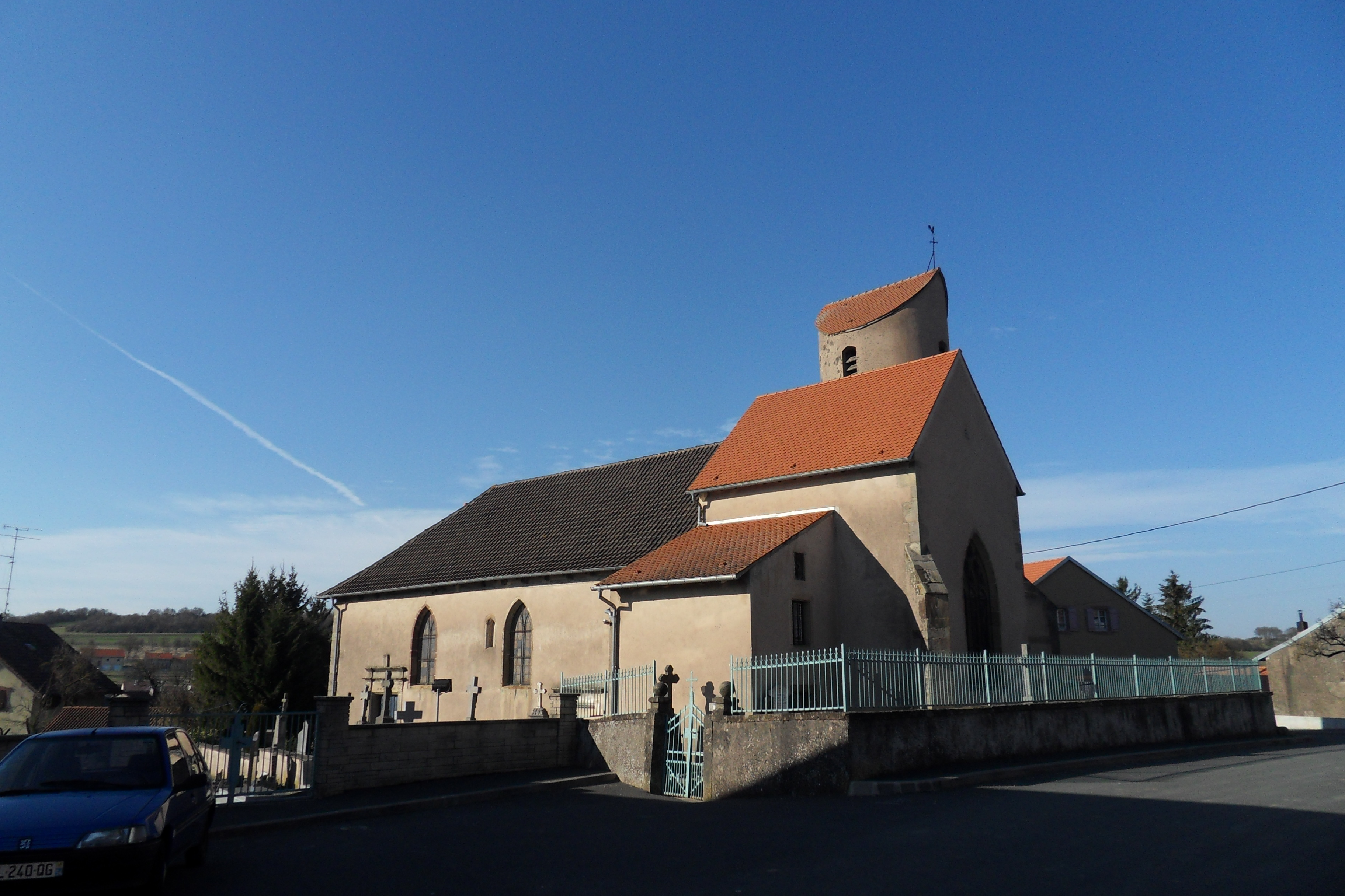 Église Saint-Remi de Xouaxange